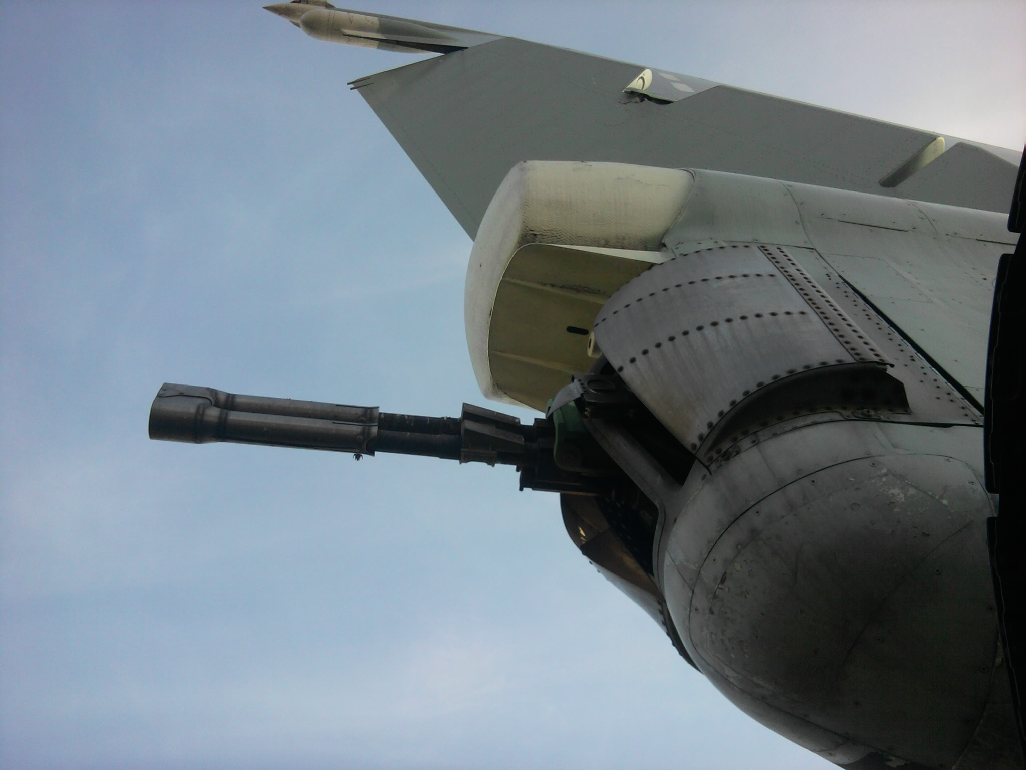 Пушка ГШ-23 в корме самолёта Ту-22. Фото в Киевском музее авиации.